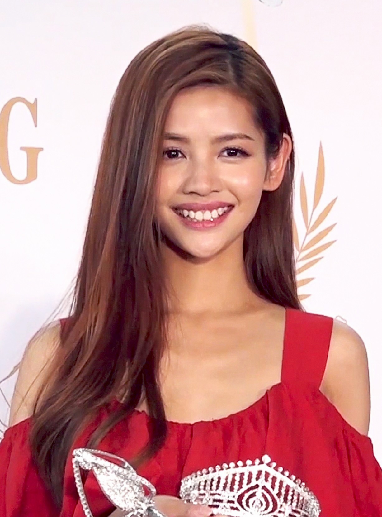 中文（香港）: 《2019年度香港小姐競選》之「Little Miss Hong Kong」記者會